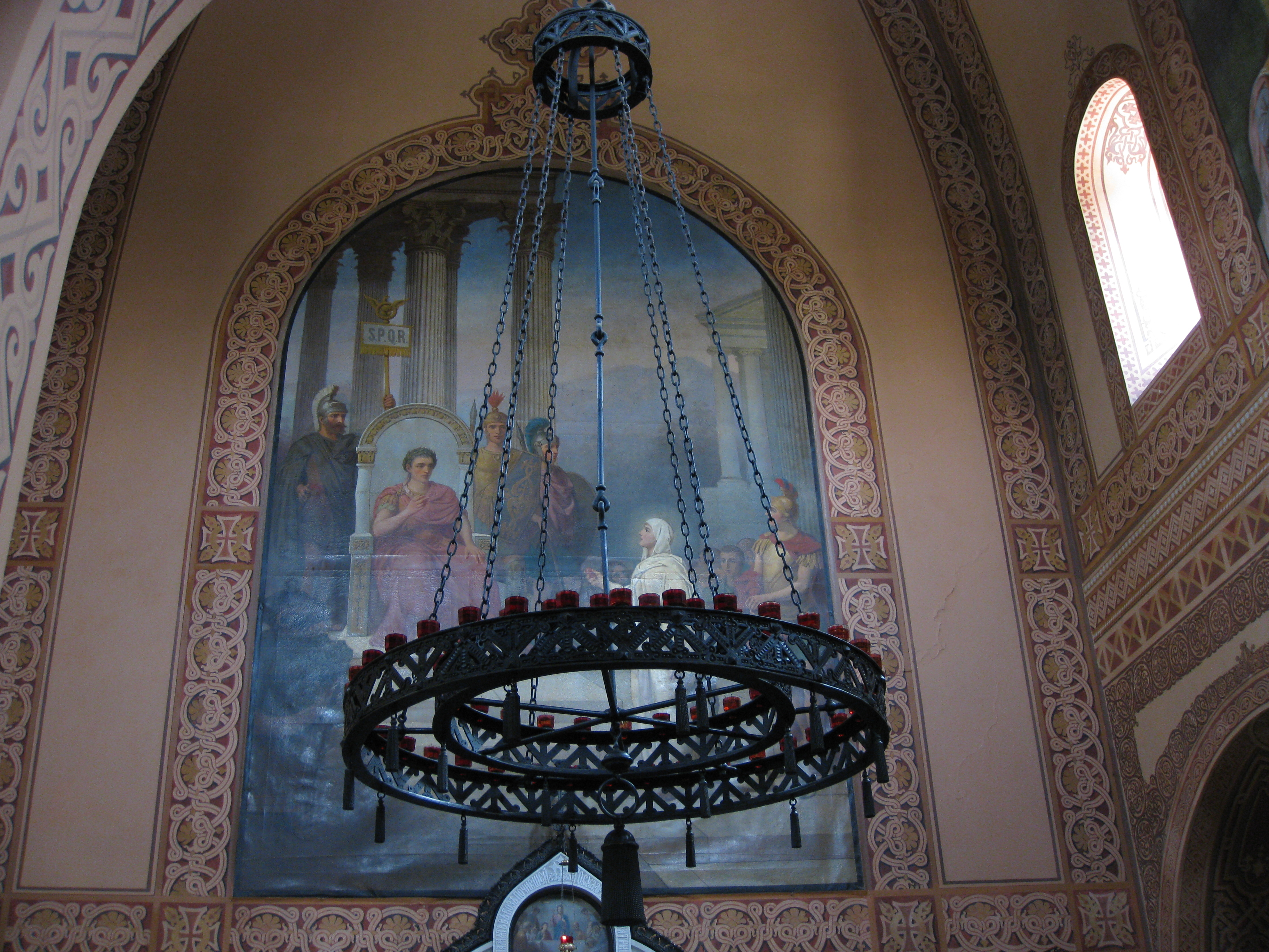 Church of Saint Mary Magdalene כנסיית מריה מגדלנה (כנסיית הבצלים)